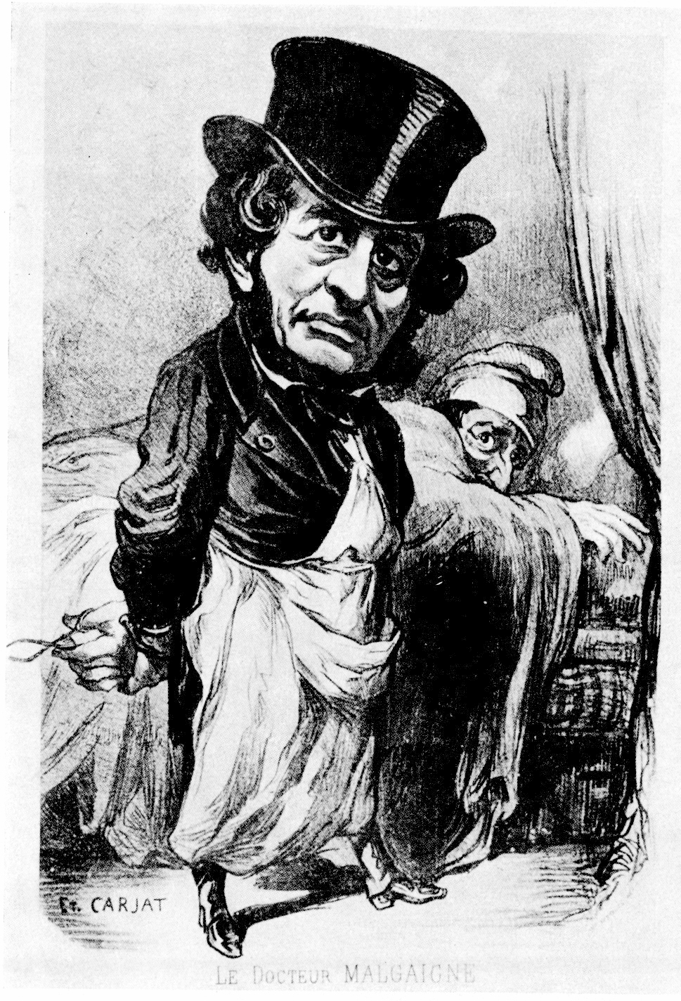 Portrait von J.F. Malgaigne